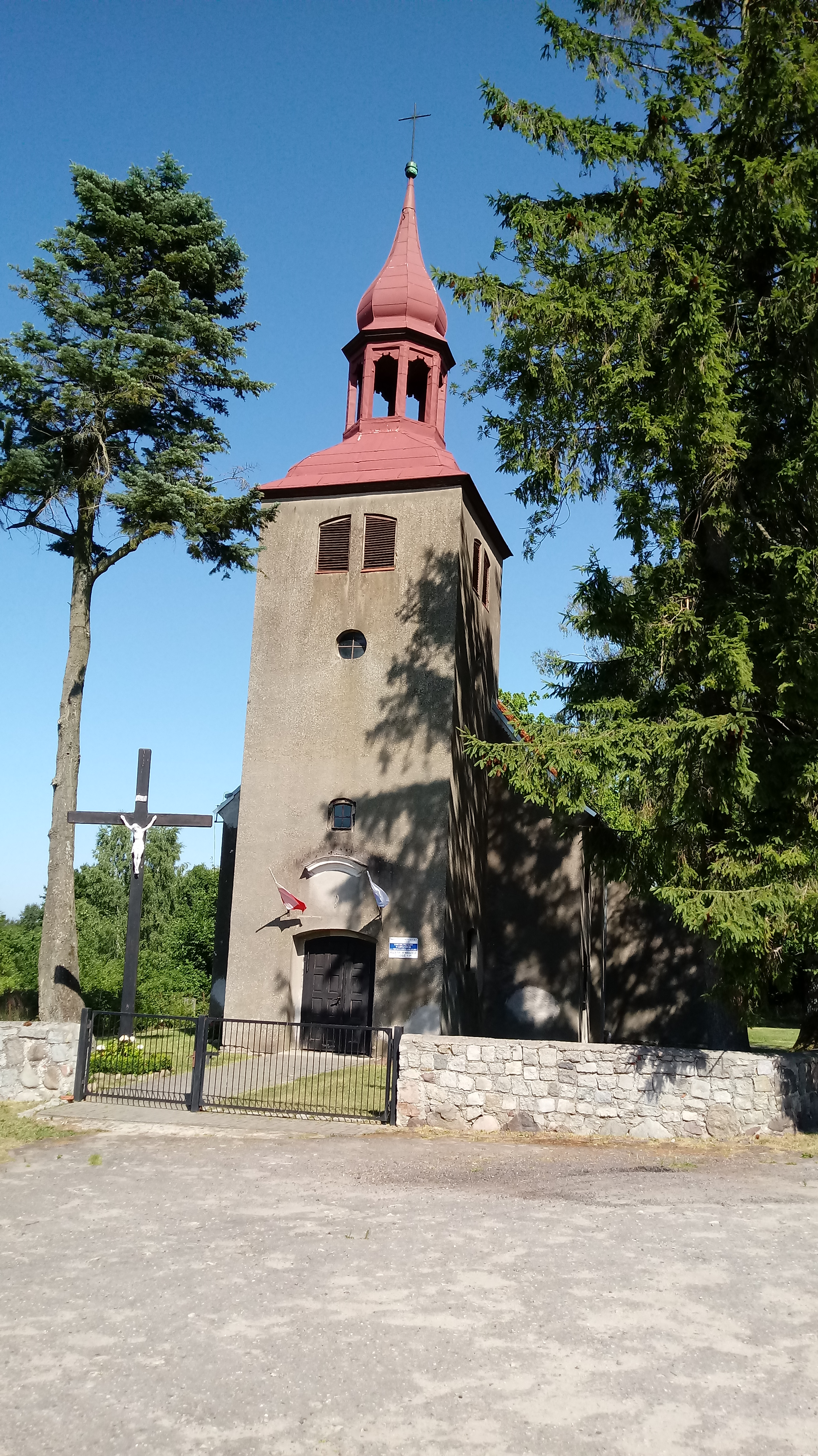 Widok na wieżę kościoła pw. Najświętszego Serca Pana Jezusa